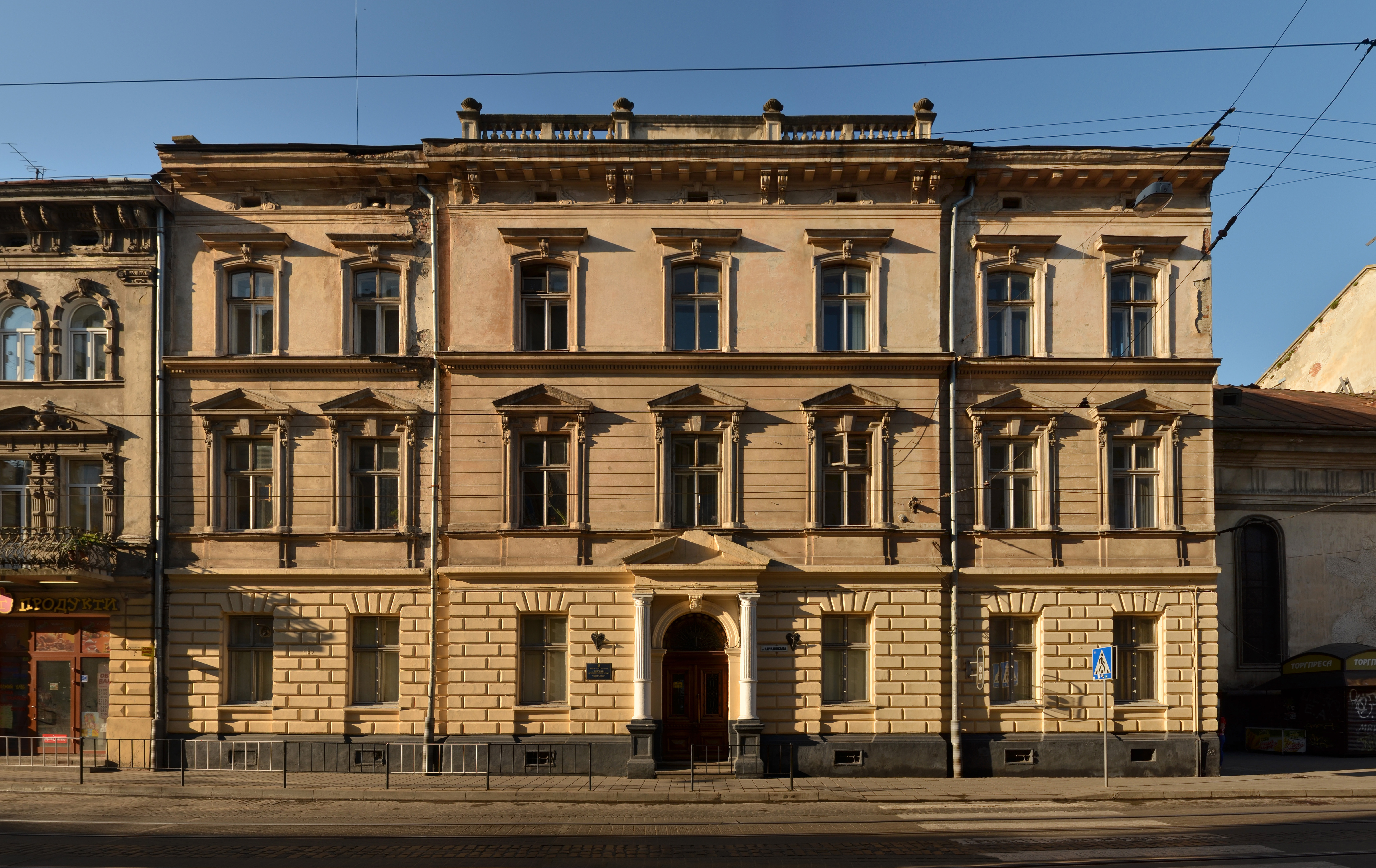 Будинок № 2 на вулиці Личаківській у Львові. Збудований 1892 року за проектом Міхала Ковальчука (1855—1938) і В. Пшетоцького.